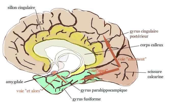 Voie 1 dorsale du "quoi", voie 2 ventrale du "comment", voie 3 du "et alors" d'après Ramachandran, "Le cerveau fait de l'esprit", Dunod, 2011